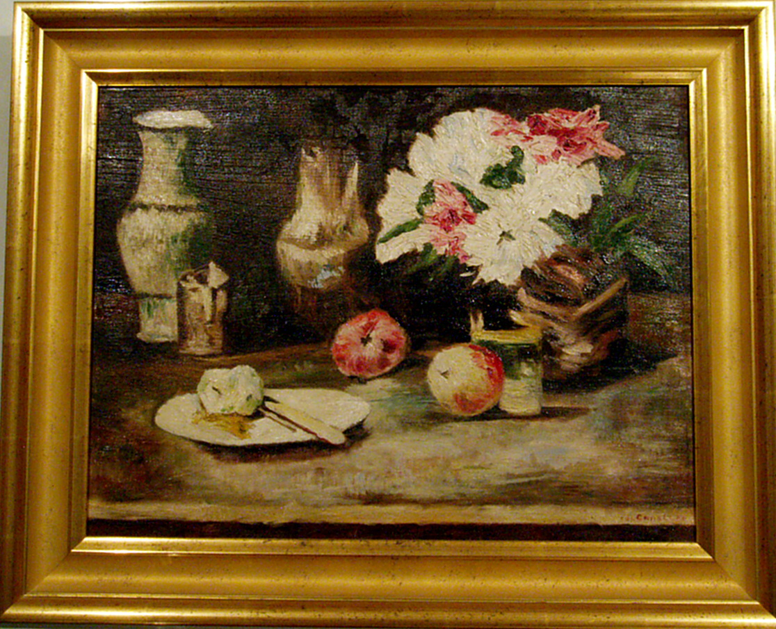 Foto aus der eigenen Sammlung der Werke des Onkels Herbert Capeller